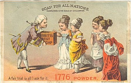 Advertisement for Babbitt's Soap